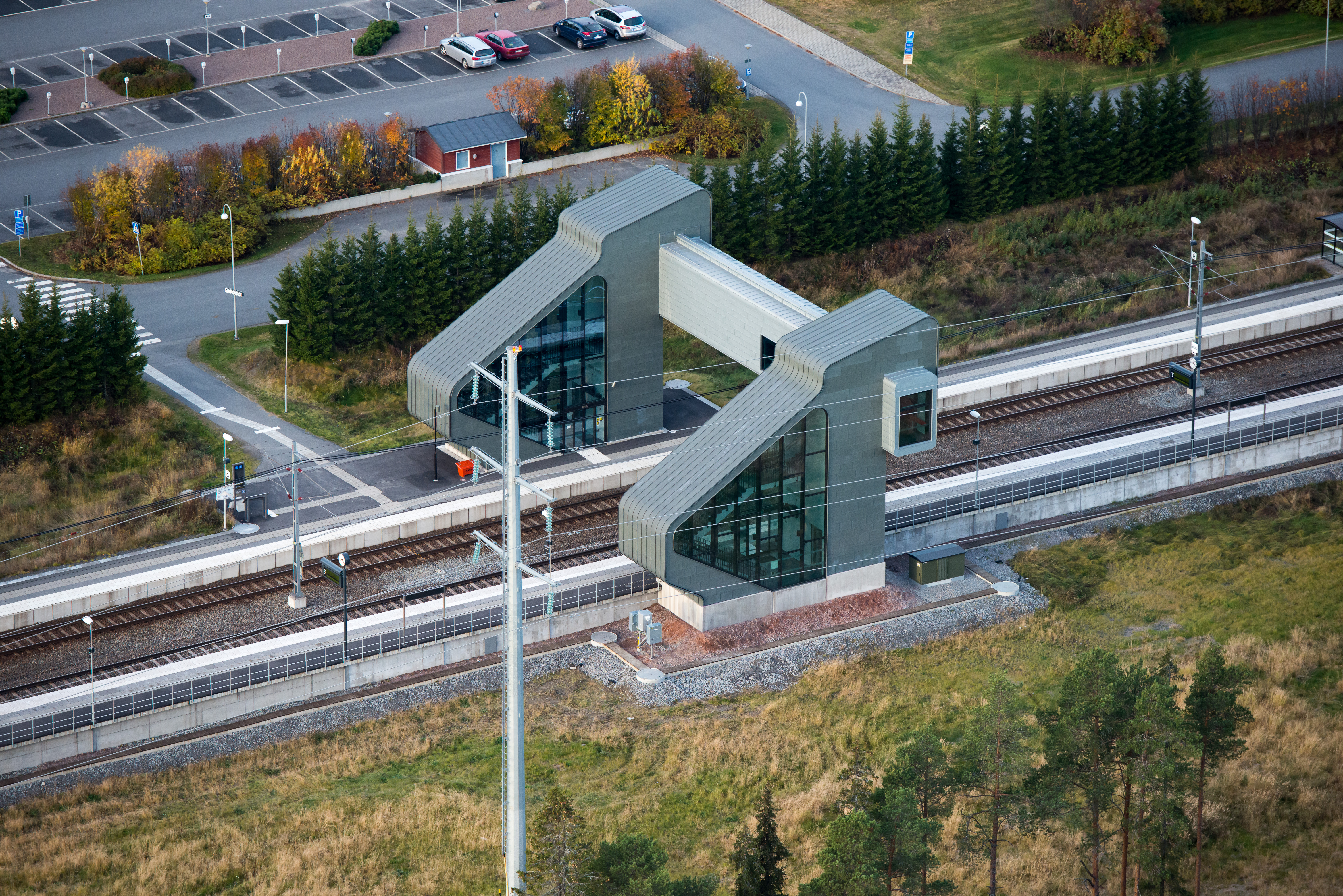 Hållplats för järnvägen vid Sunderby sjukhus.